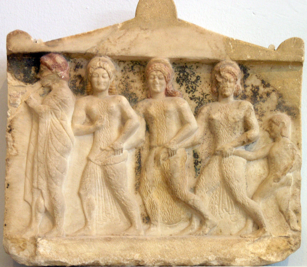 Relief des Trois Grâces. Trois femmes dansent, se tenant par le poignet, la dernière tenant un petit garçon. L'homme qui les précède marque le rythme en jouant de la flûte double. Début du Ve s. av. J.-C.